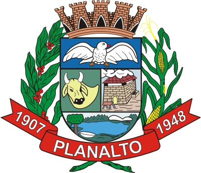 Brasão do município de Planalto-SP